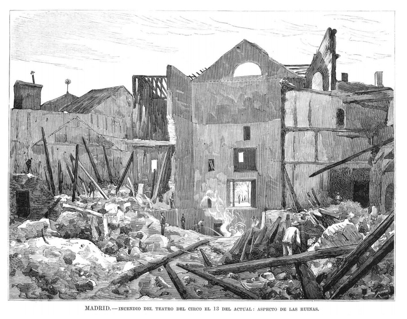 Ruinas del Teatro del Circo tras el incendio del 13 de noviembre de 1876, Madrid.